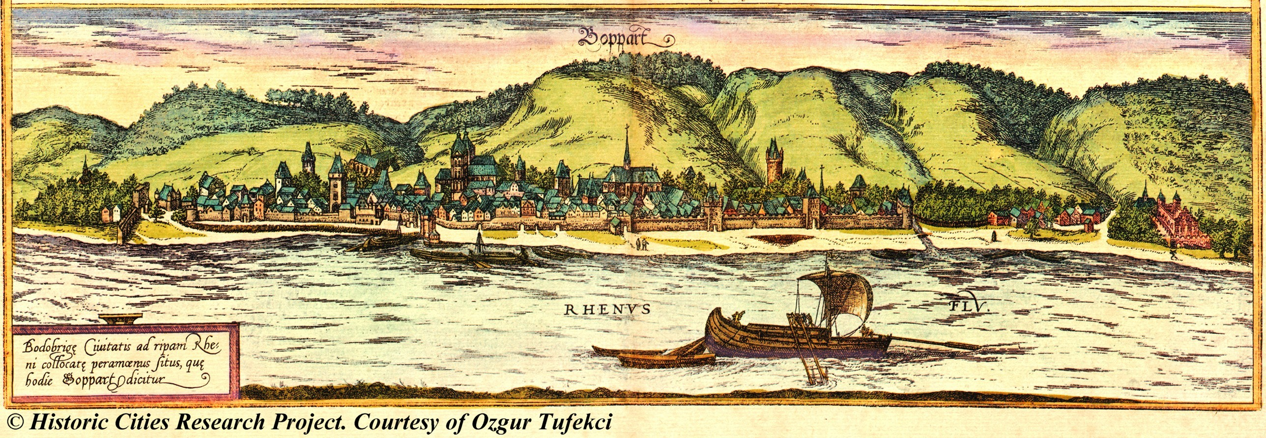 Historische Malerei, die Boppard im Jahr 1588 zeigt, von Braun & Hogenberg